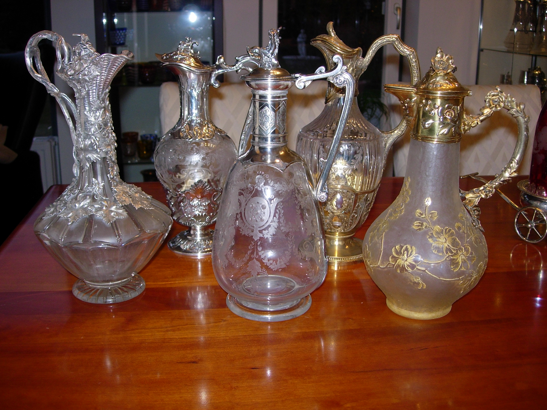 5 Karaffen